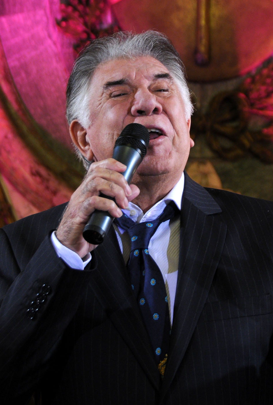 Raúl Lavié en el Salón Blanco, durante el recital que llevó a cabo el viernes a la noche.